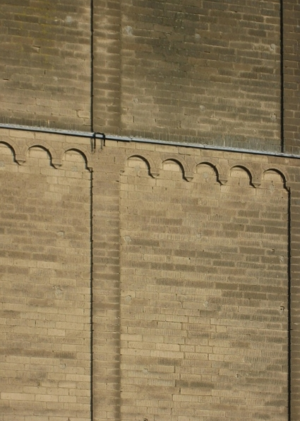 Lisene